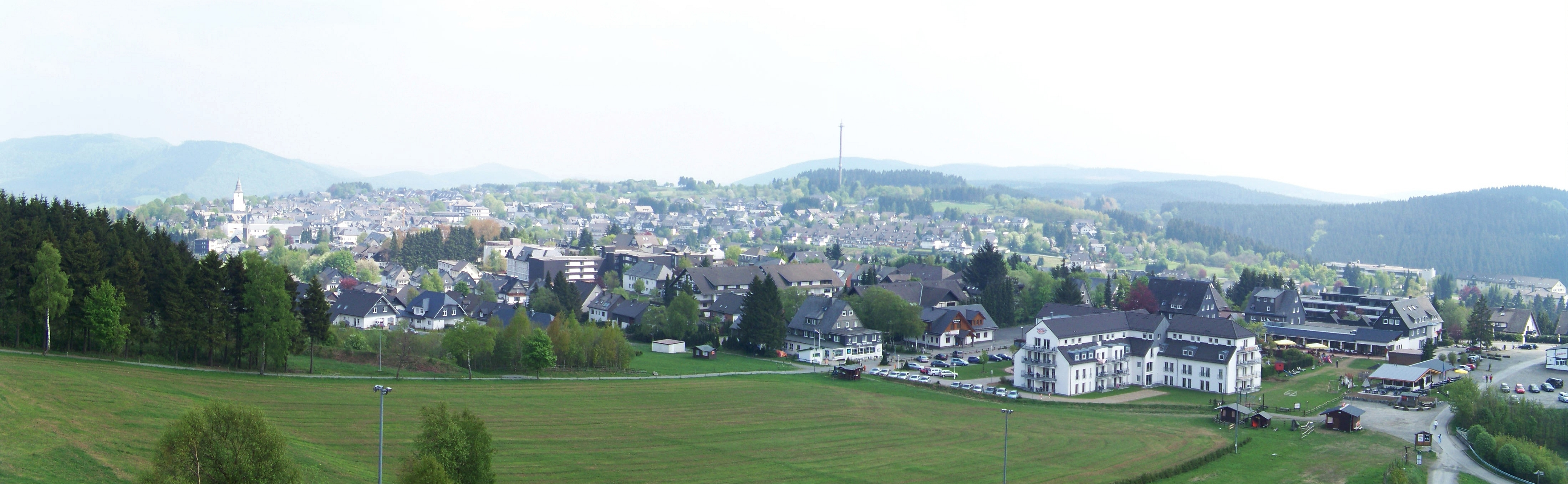 Winterberg, Panoramabild (Germany)